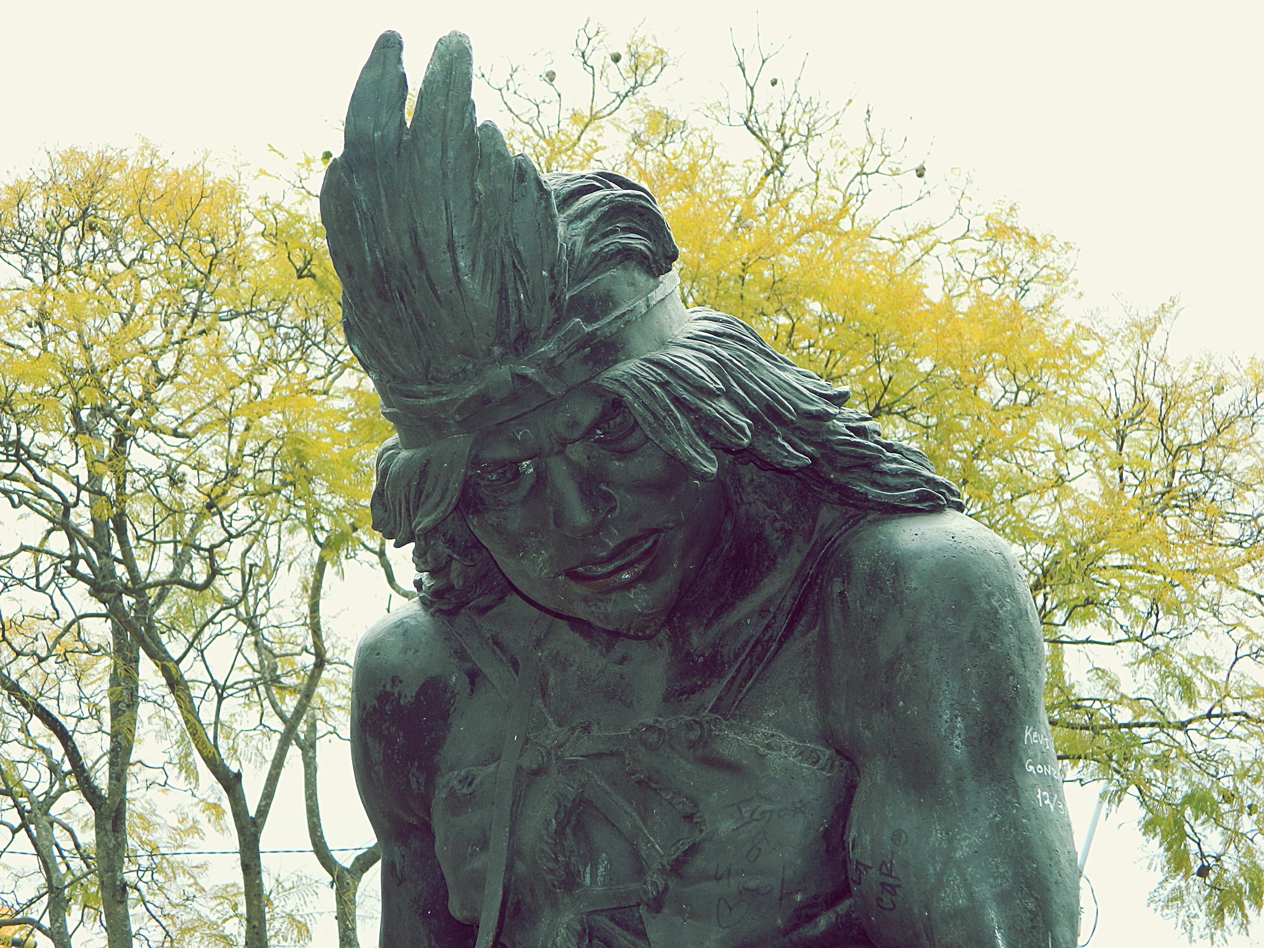 Abayubá. Ubicada en el departamento de Montevideo